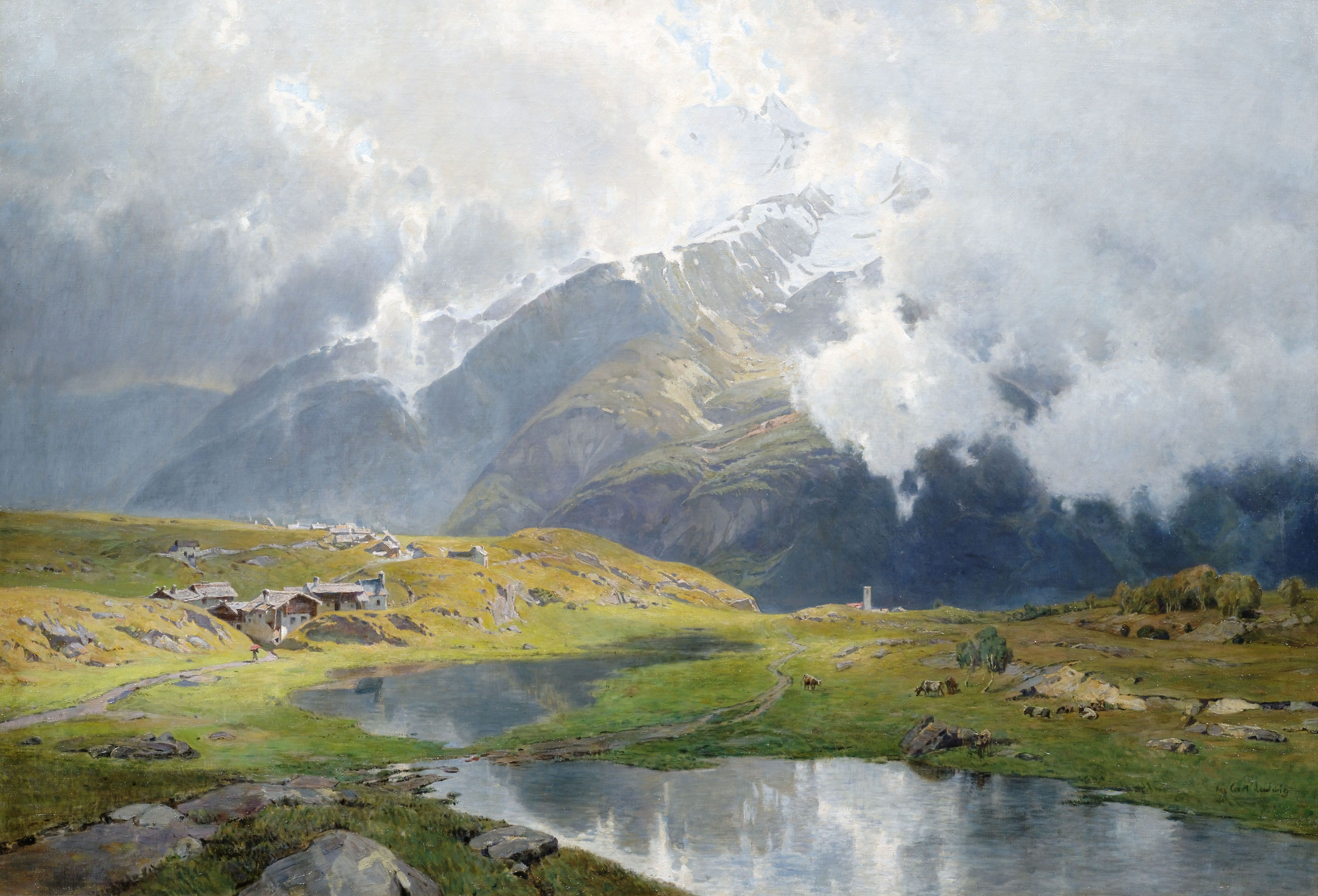 Wolkenverhangene Hochgebirgslandschaft. Öl auf Leinwand, unten rechts signiert, rückseitig auf der Leinwand gestempelt "No. 2452 der Königl. Gemälde-Galerie zu Dresden 1913". 92 x 135 cm